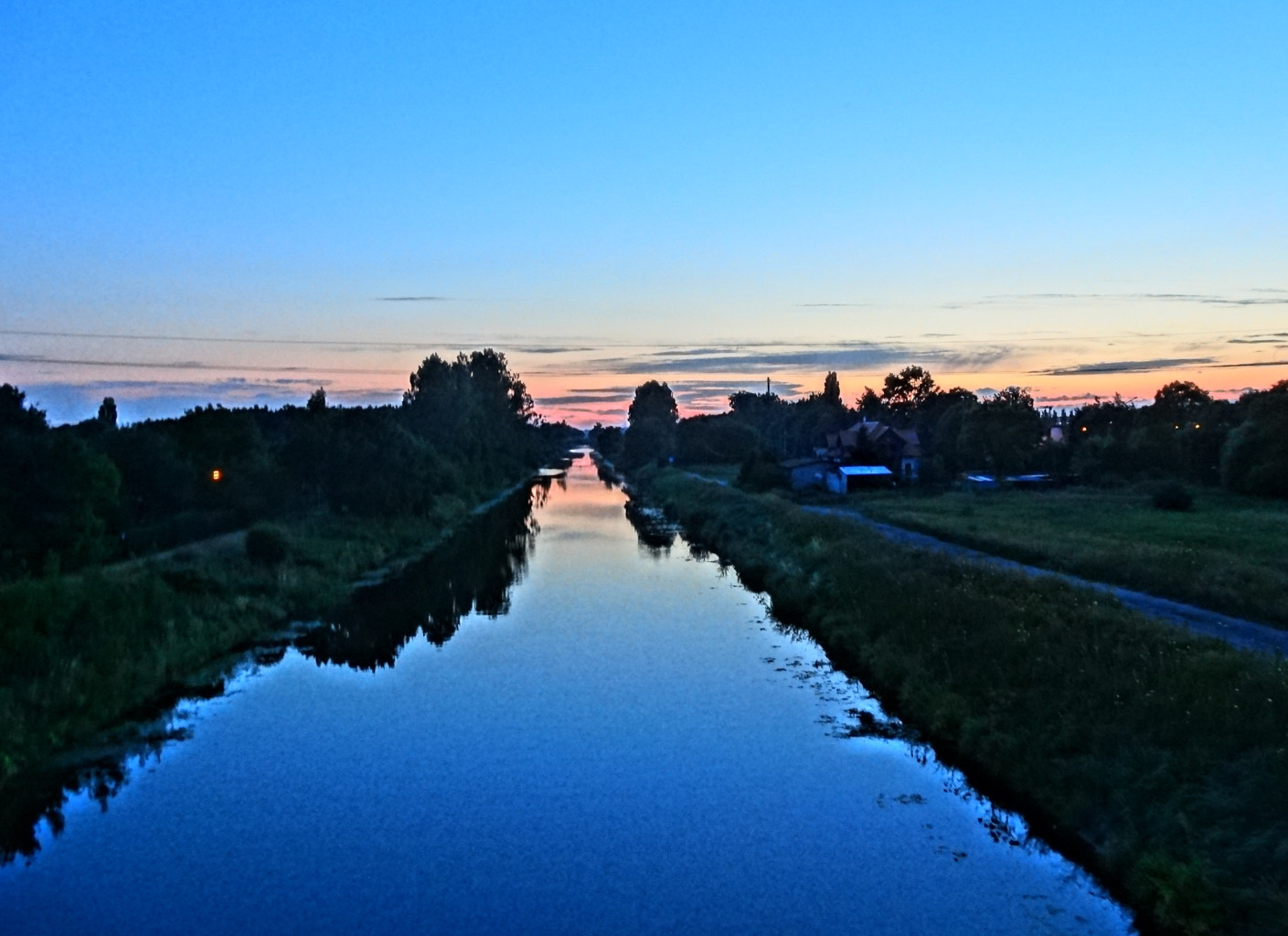 Zmierzch nad Kanałem Bydgoskim w Bydgoszczy